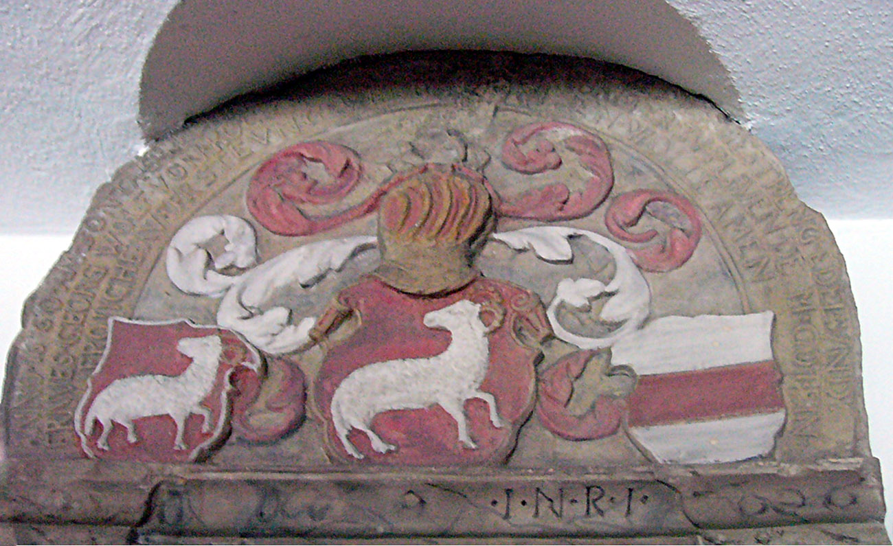 Ausschnitt aus dem Epitaph des Georg Wolf von Kotzau in der Jakobuskirche von Oberkotzau